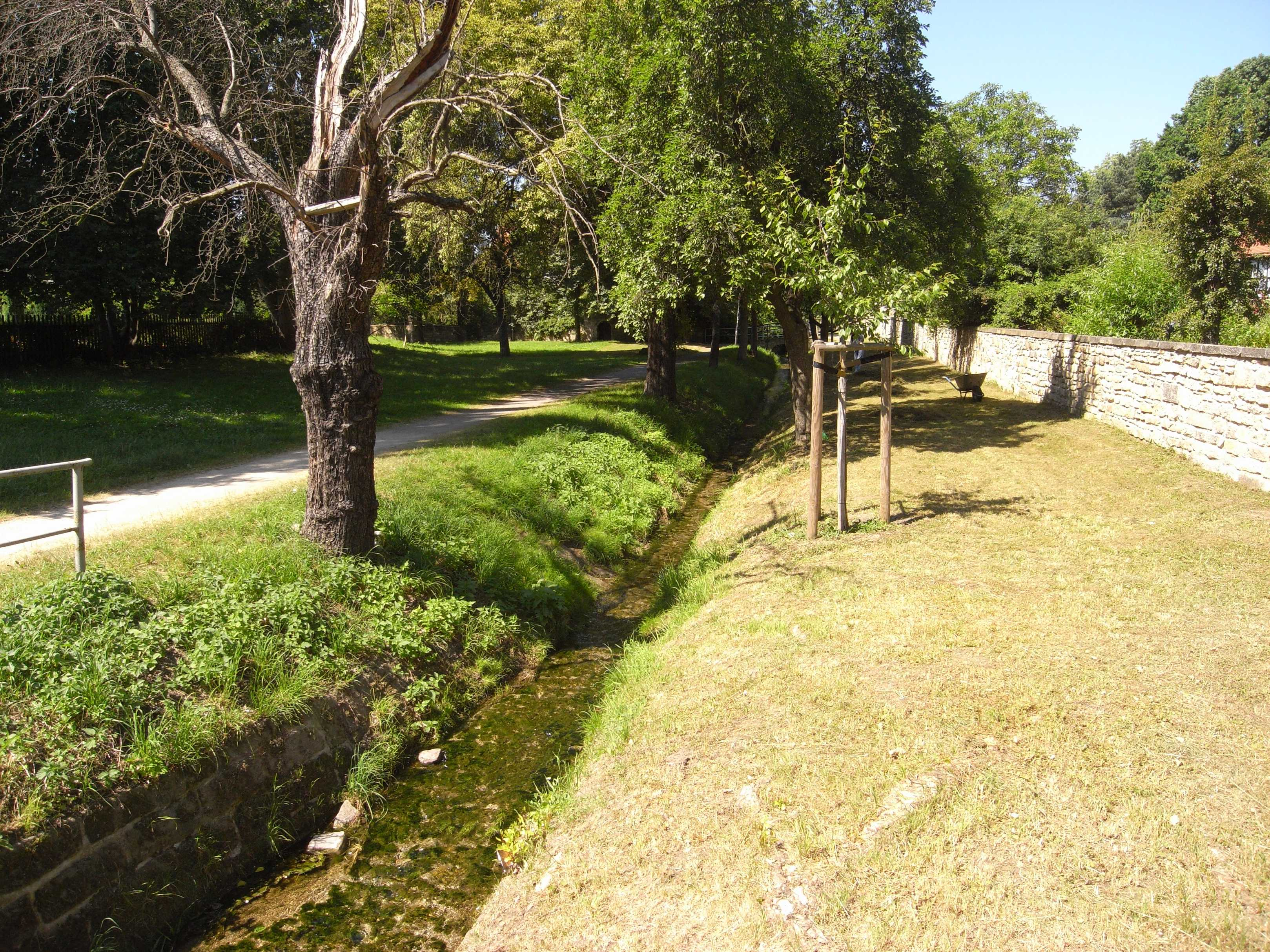 Leubnitzbach am Pfarrgut von Dresden-Leubnitz (Dresden, Sachsen, Deutschland)